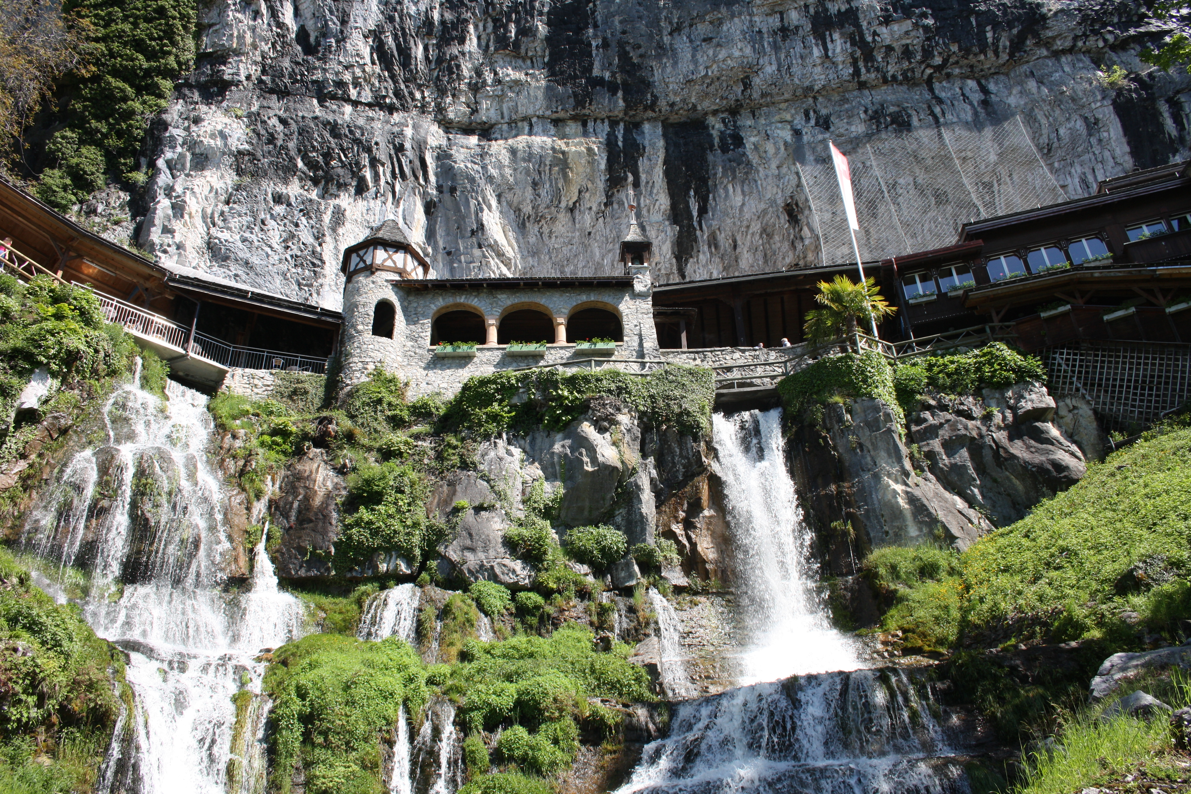 St. Beatus-Höhlen, Eingang und Beatusbach